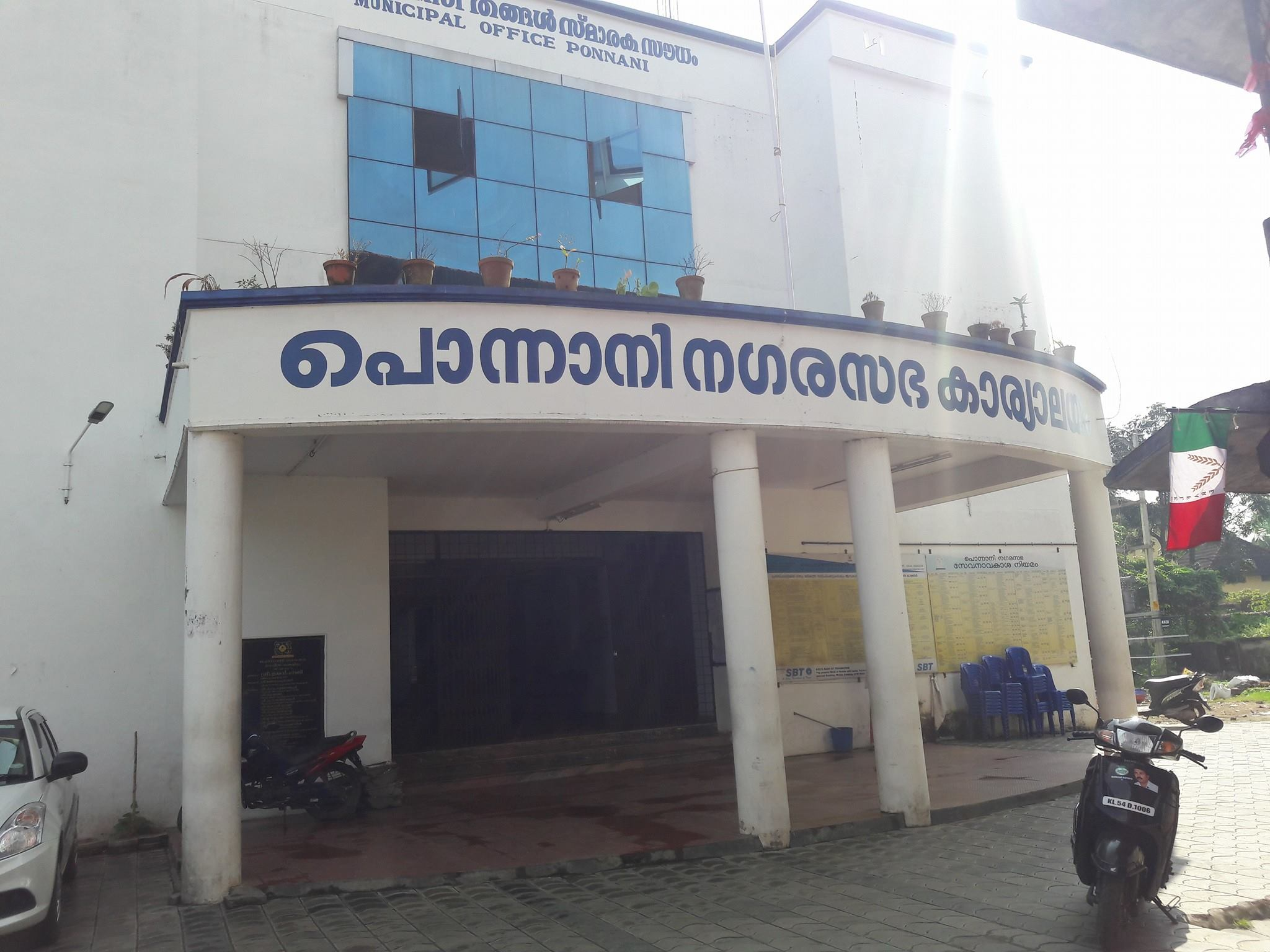 പൊന്നാനി നഗരസഭ